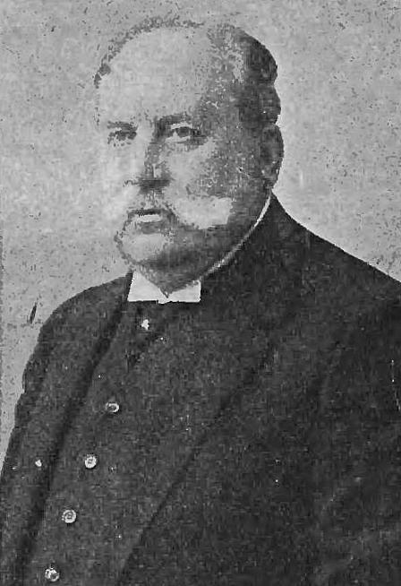 Eustachy Zagórski (-1907)